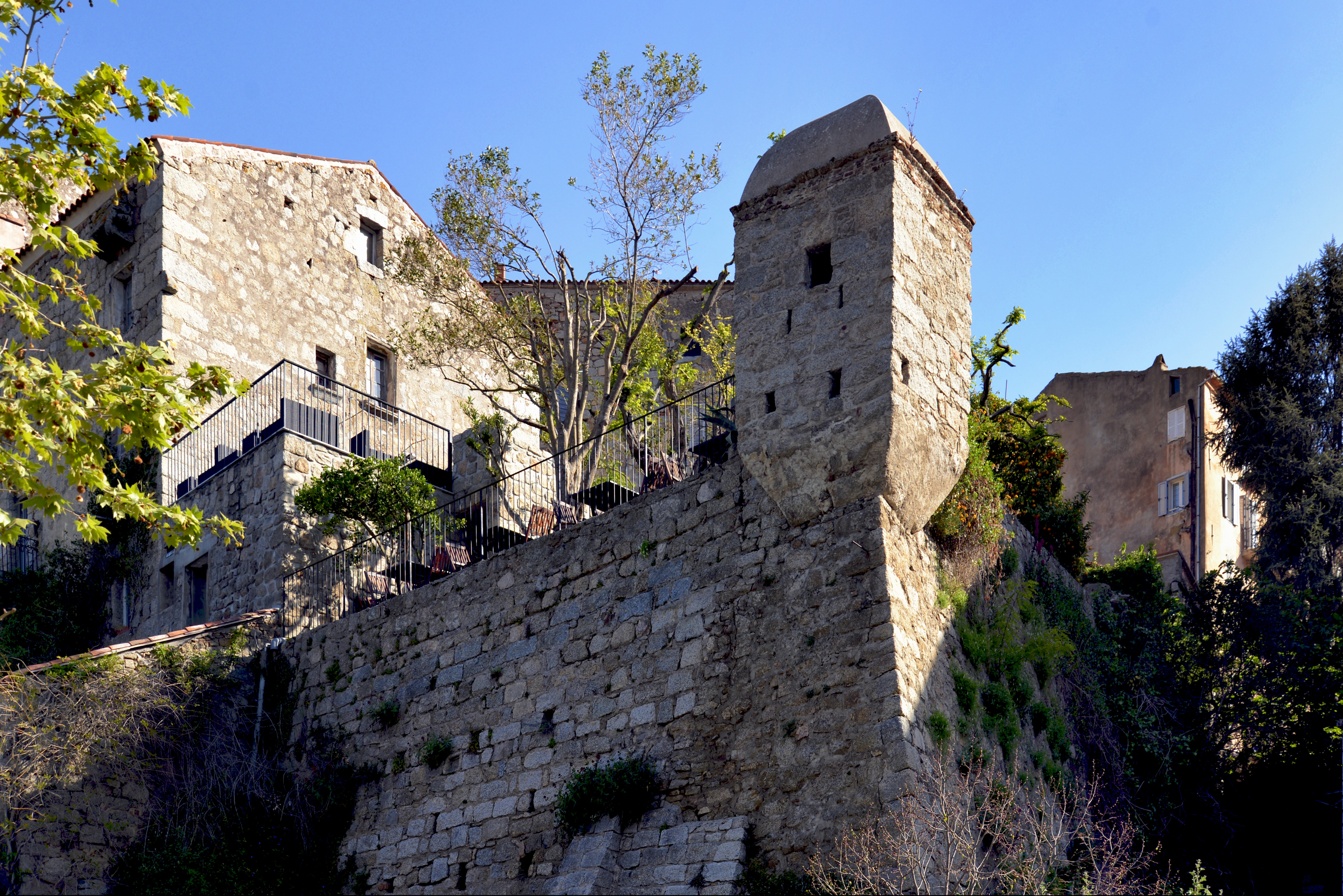 Sartène (Corse-du-Sud) - L'échauguette et remparts de la ville.